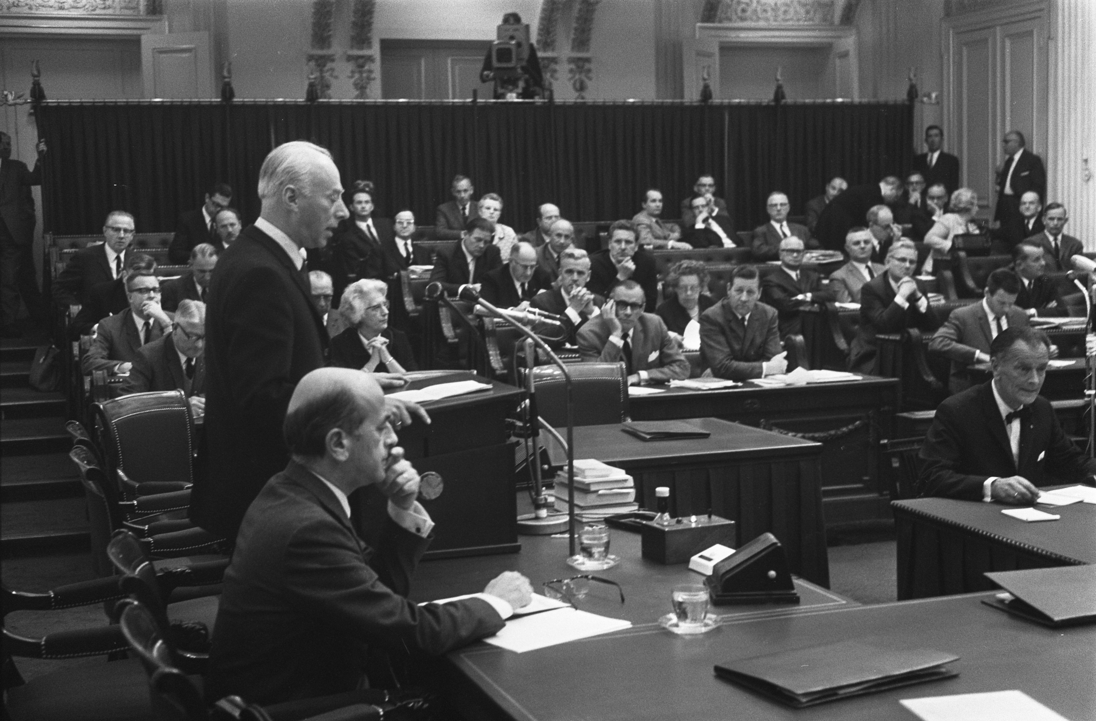 Collectie / Archief : Fotocollectie Anefo Reportage / Serie : [ onbekend ] Beschrijving : Tweede Kamer behandelt toestand in Curacao nr. 6a : mevrouw Padt Janse (kop) Datum : 3 juni 1969 Locatie : Curacao Trefwoorden : politiek Instellingsnaam : Tweede Kamer Fotograaf : Koch, Eric / Anefo Auteursrechthebbende : Nationaal Archief Materiaalsoort : Negatief (zwart/wit) Nummer archiefinventaris : bekijk toegang 2.24.01.05 Bestanddeelnummer : 922-4860